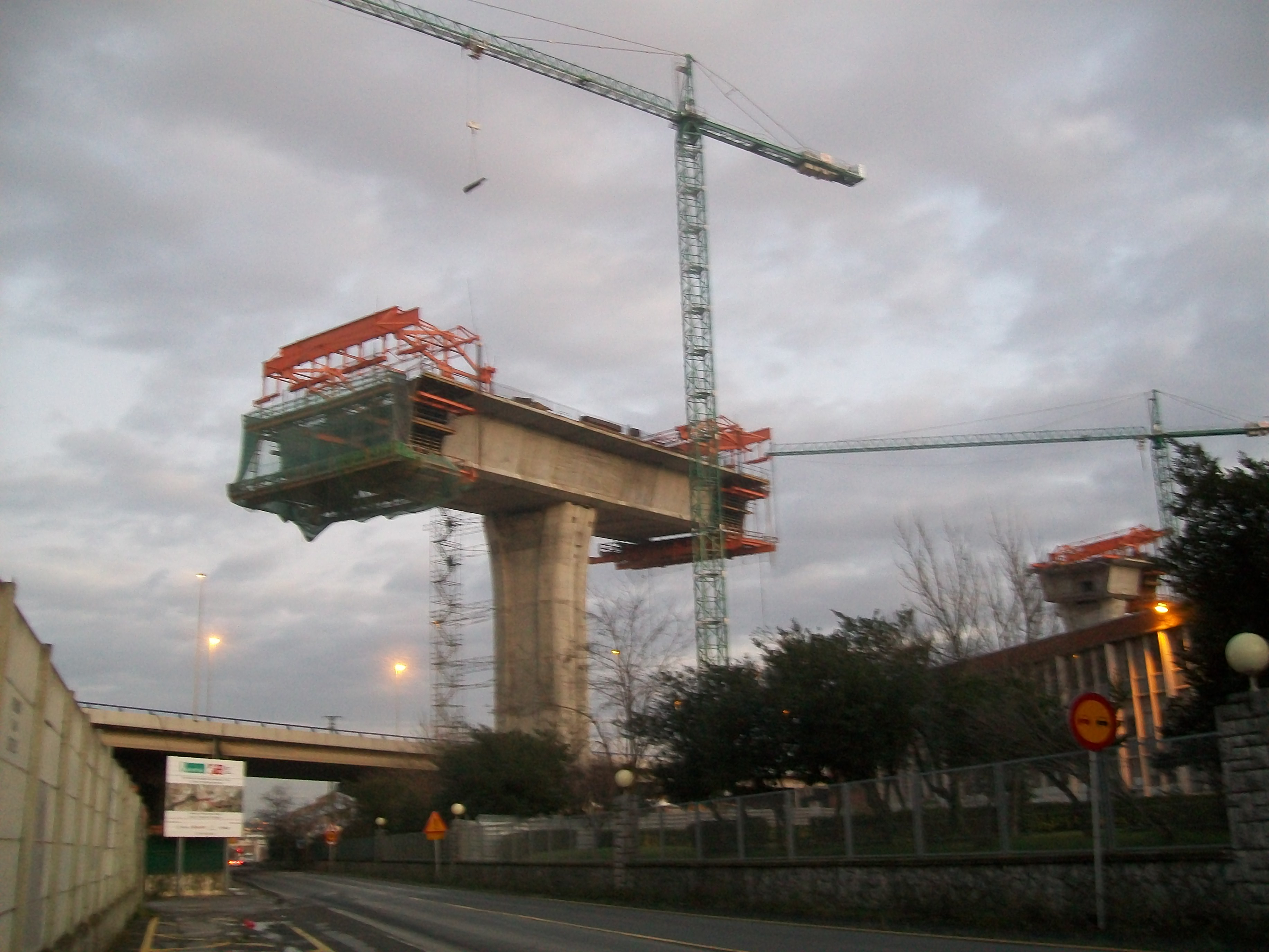 Viaducto de Trapagaran (obras Supersur)